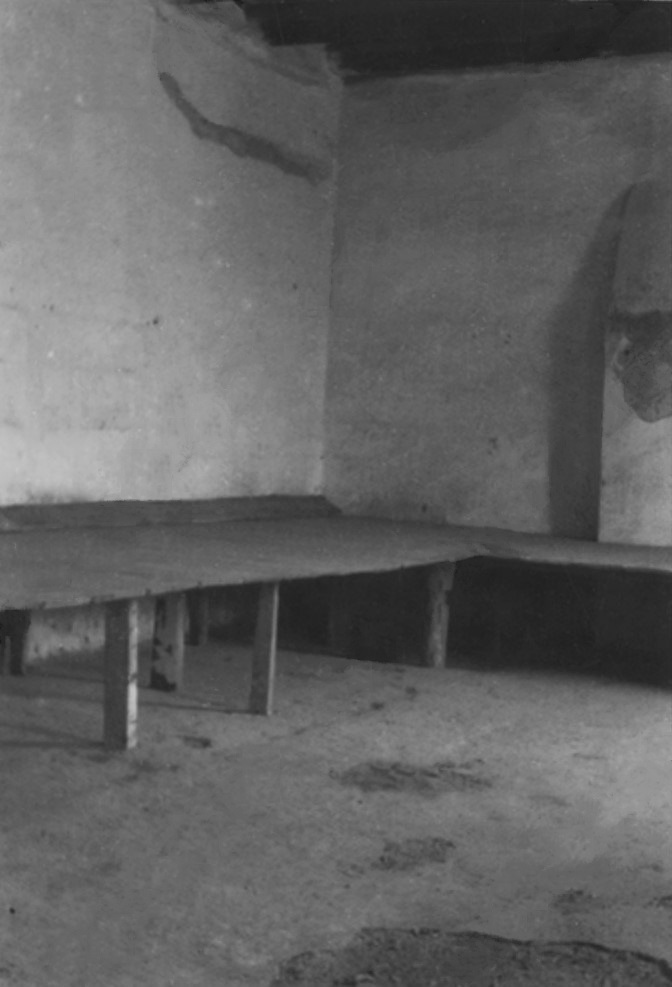 Туркмения. Красноводск. Камера, в которой содержались бакинские комиссары перед расстрелом